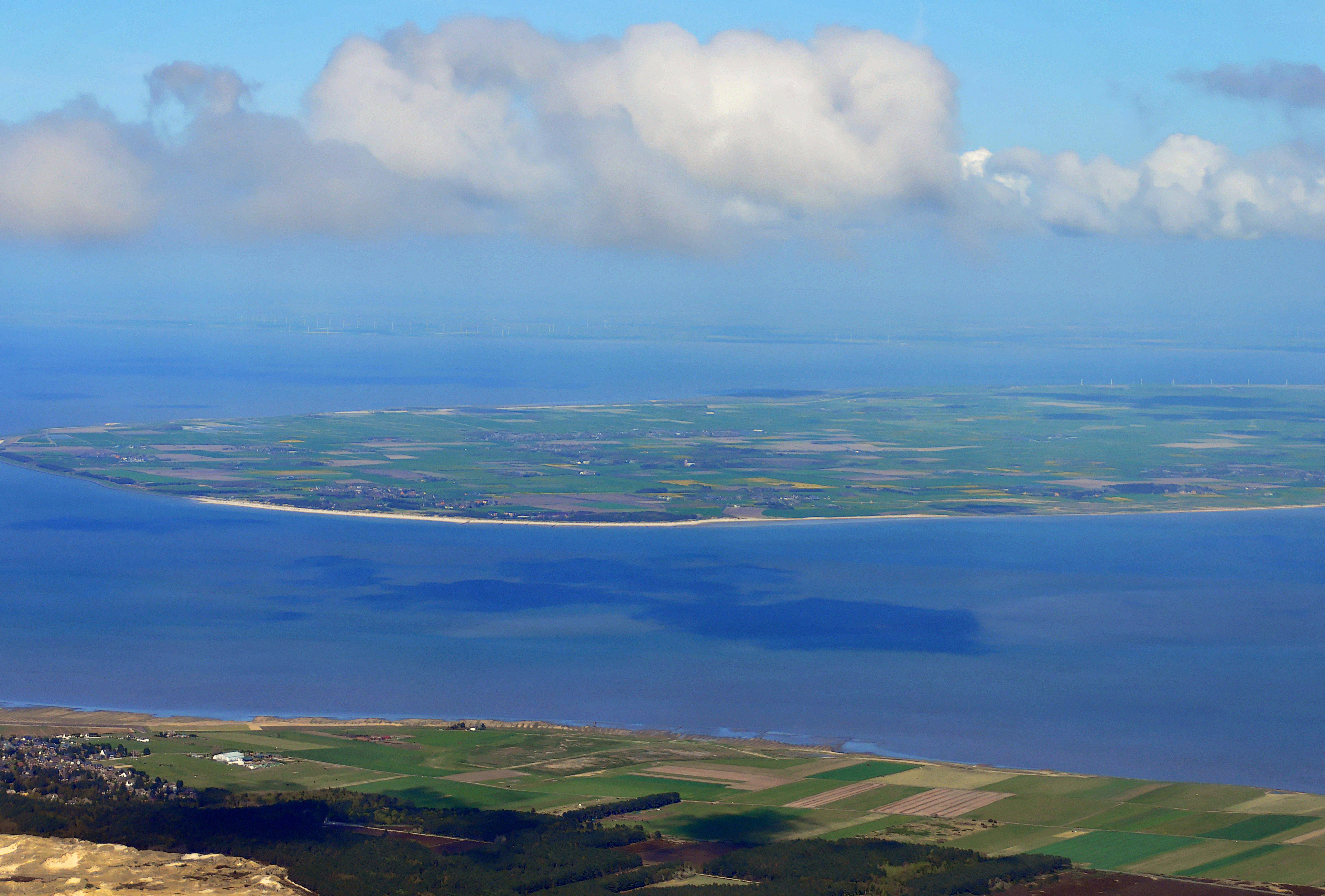 Luftbilder von der Nordseeküste 2012-05: vorne Amrum, hinten Föhr